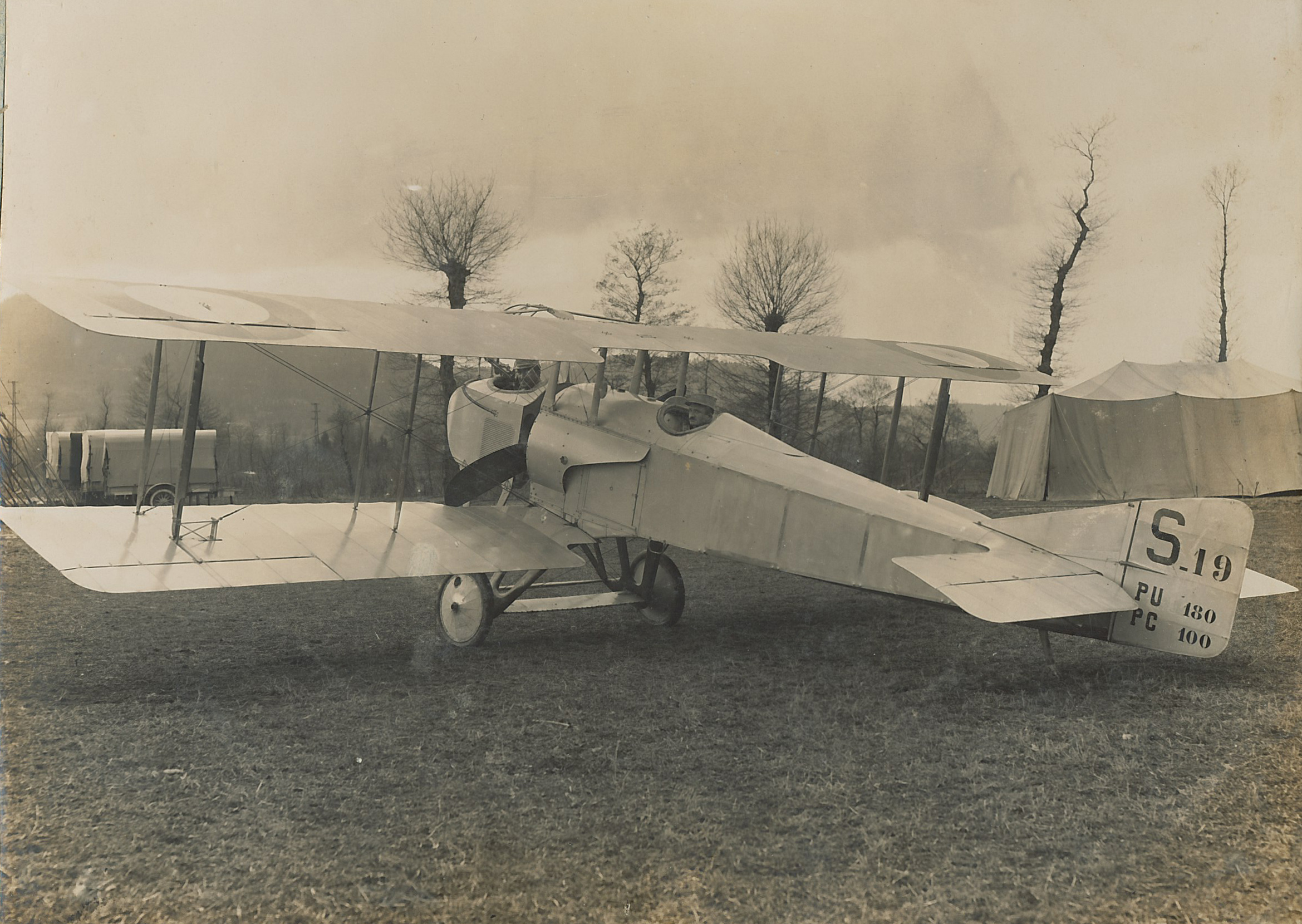 Un SPAD A.2 de la N49 à Corzieux.